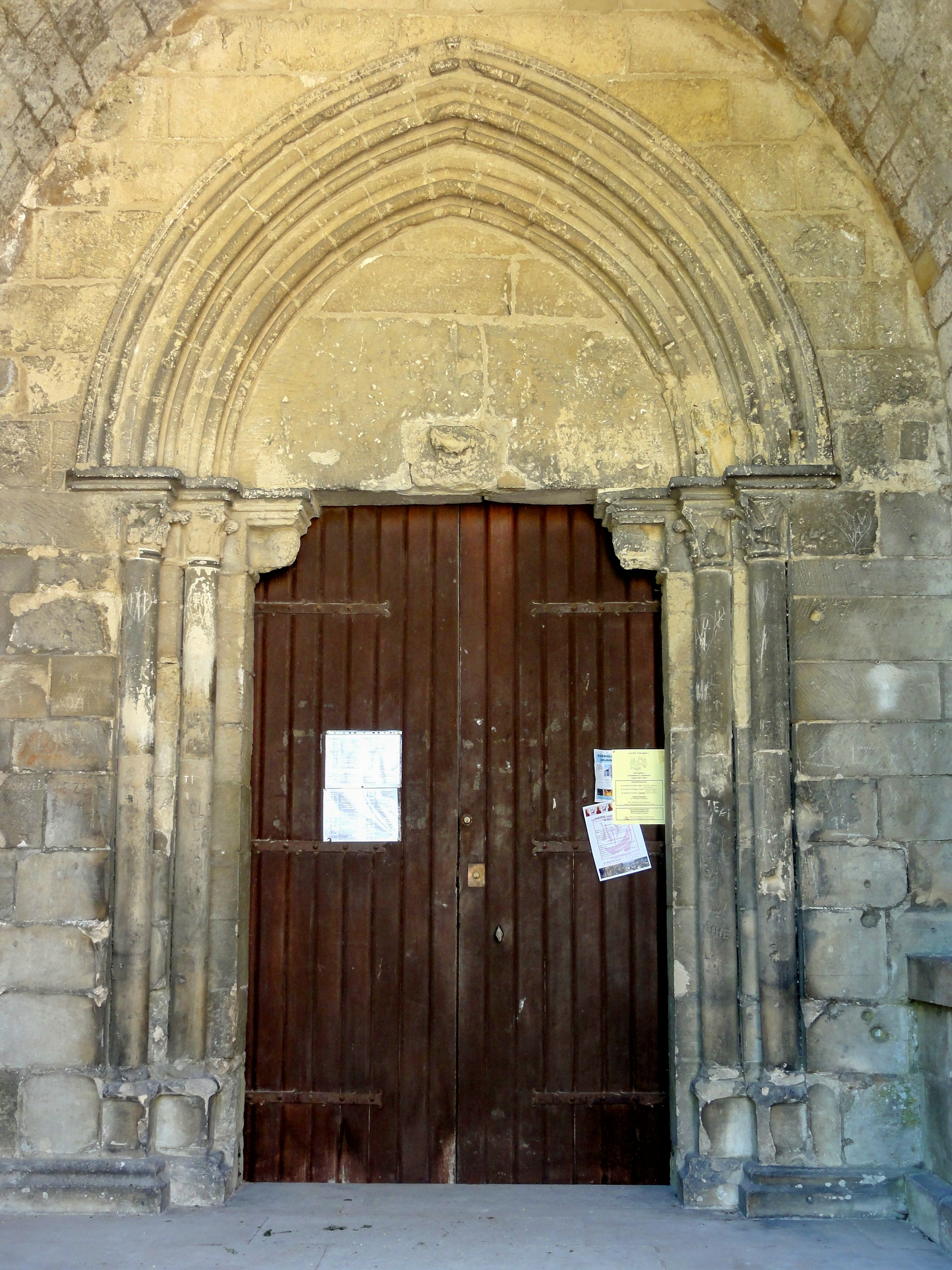 Le portail occidental, sous le porche.